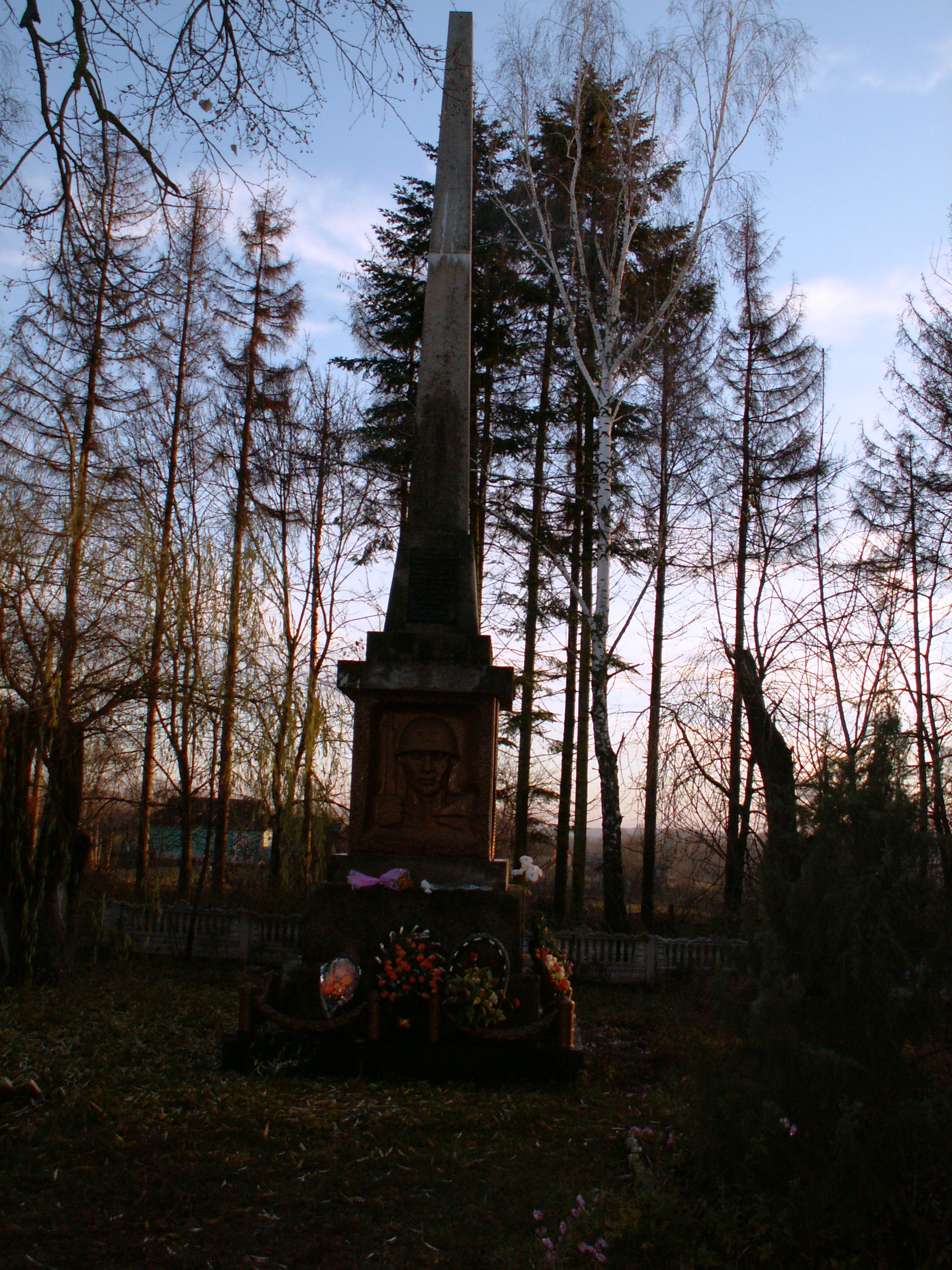 Пам’ятник 142 воїнам – односельчанам, загиблим на фронтах ВВВ, с. Пилява, Пилявська с/р, біля школи